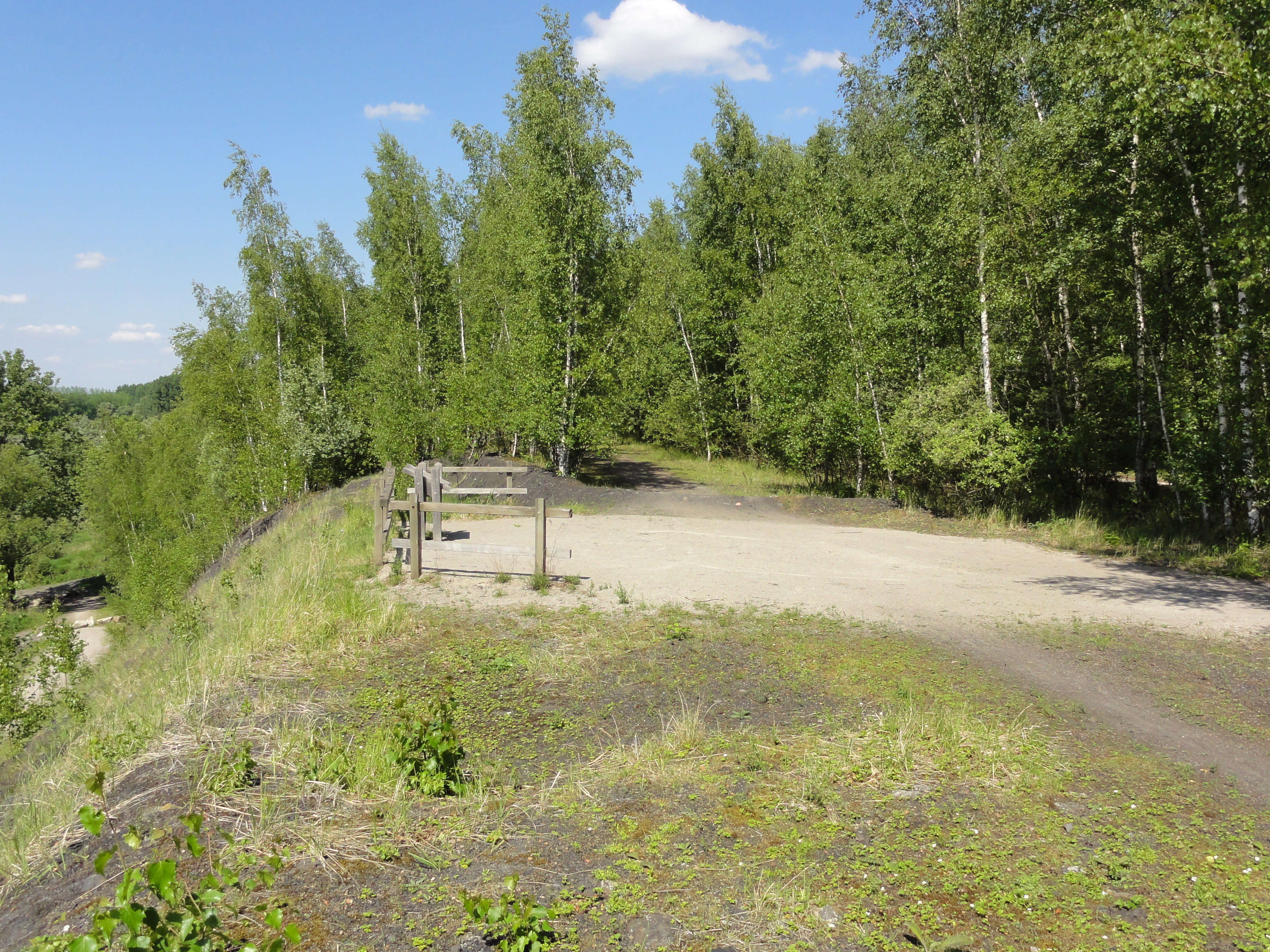 Terril no 144 dit Rieulay, fosses De Sessevalle et Lemay de la Compagnie des mines d'Aniche dans le bassin minier du Nord-Pas-de-Calais, Rieulay et Pecquencourt, Nord, Nord-Pas-de-Calais, France. Le terril no 144 en majeure partie, ainsi que son lac, sont inscrits sur la liste du patrimoine mondial de l'Unesco le 30 juin 2012 et y constituent le site no 27.